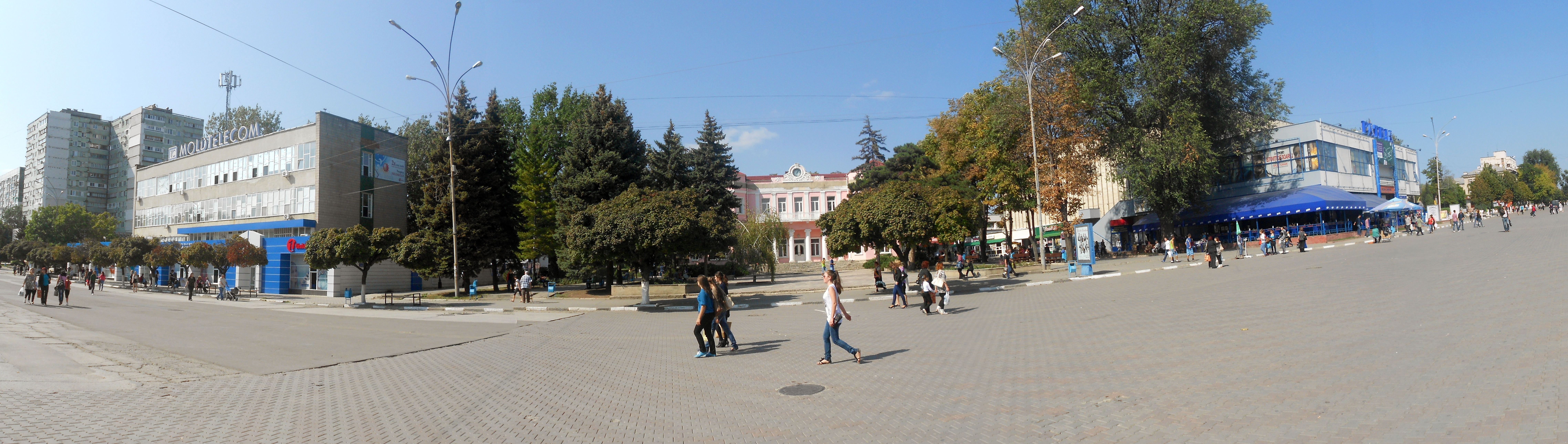 Panoramă a centrului municipiului Bălți (Piaţa Vasile Alecsandri)